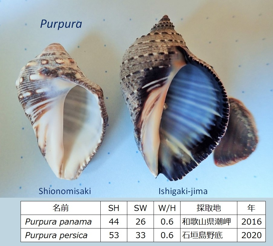 潮岬打ち上げのテツボラと石垣島生貝のホソスジテツボラ。